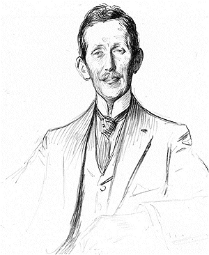 François Georges-Picot, premier secrétaire de la légation de France.